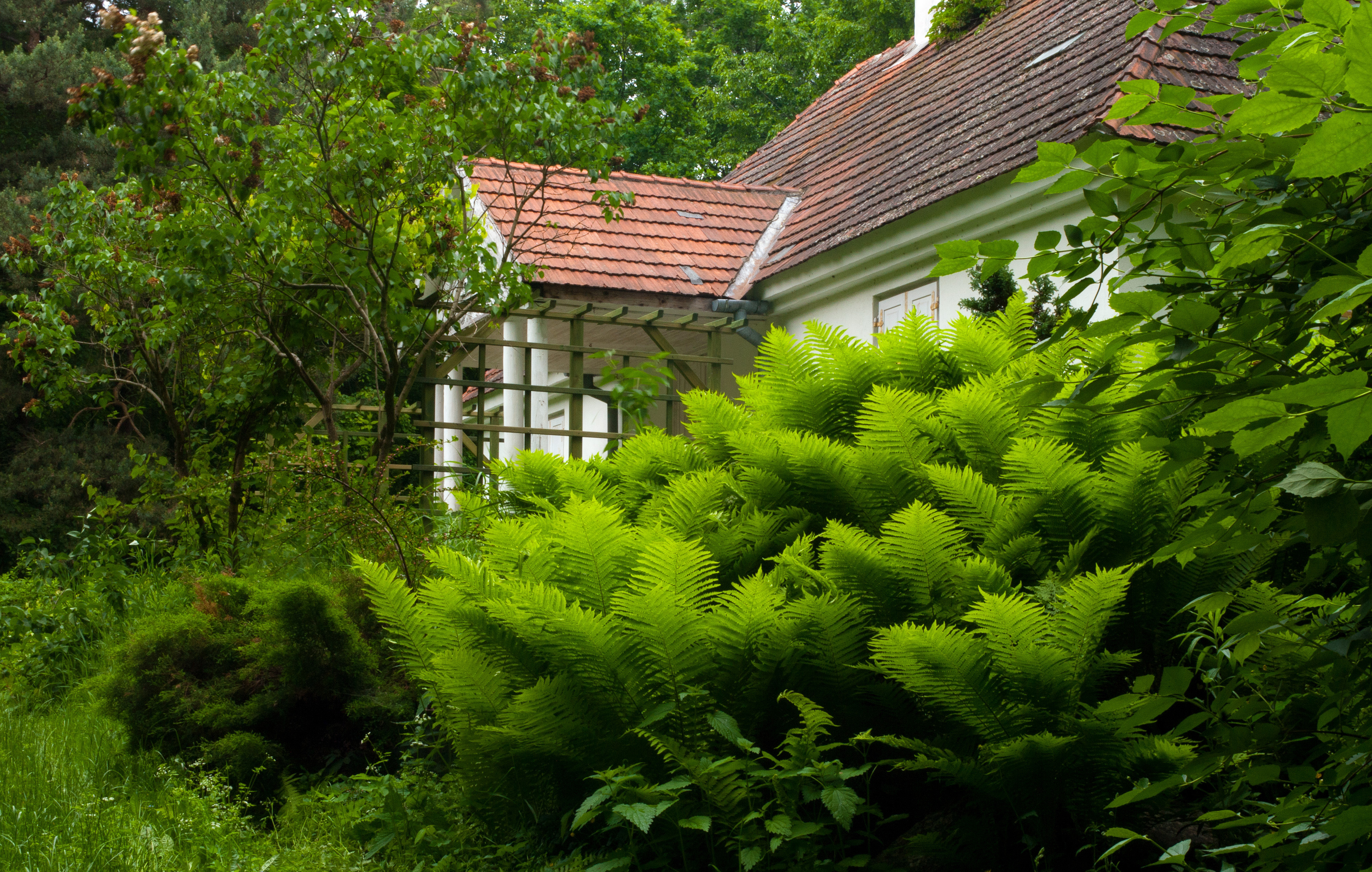 Adamowizna, zespół dworski, poł. XIX, 1900